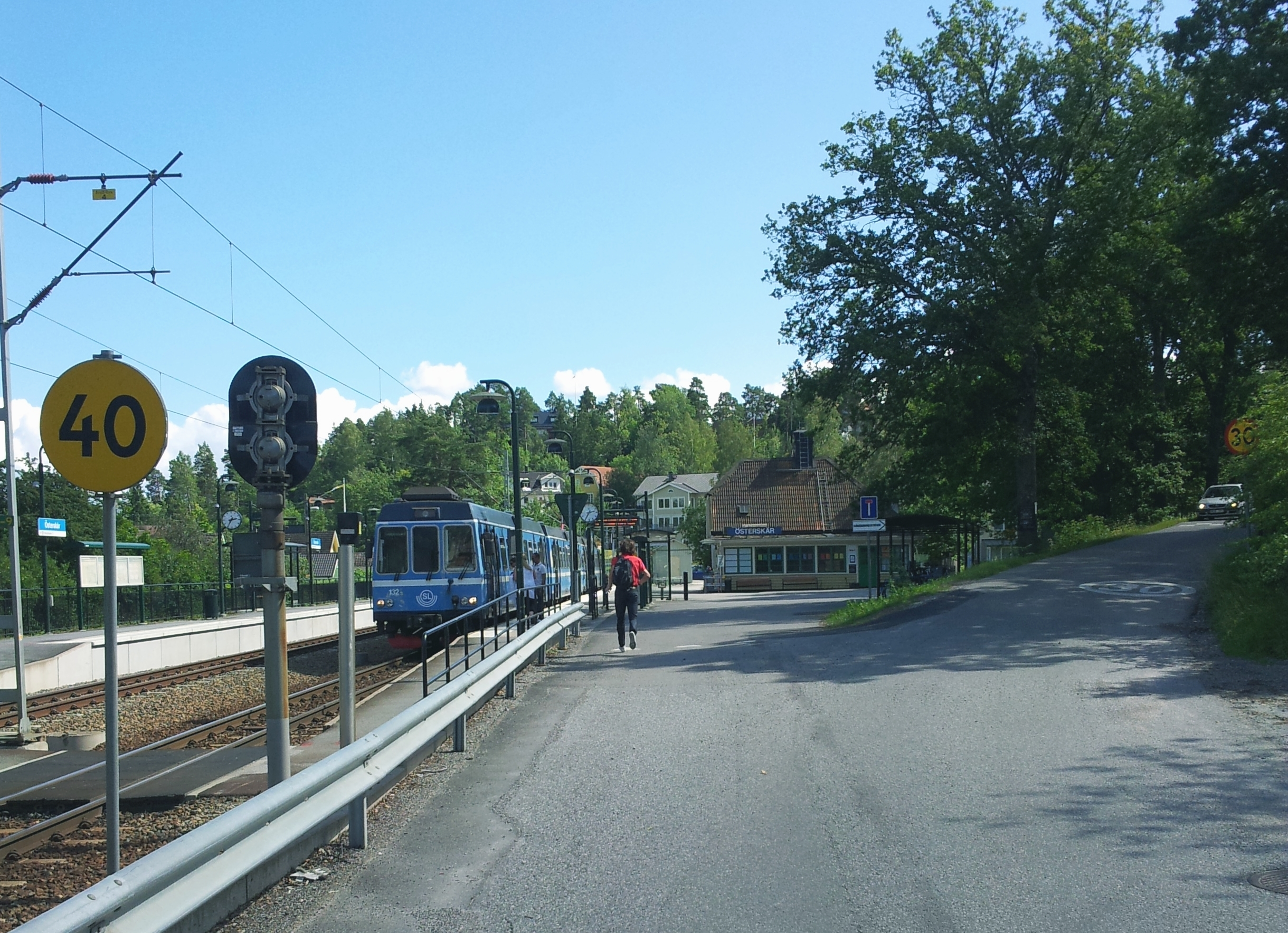 Järnvägsstationen i Österskär. Slutstation på Roslagsbanan. Juli 2012